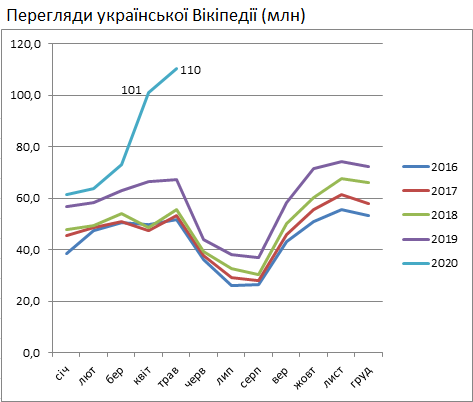 Wikipedia-uk-views-2016-2020-06-01